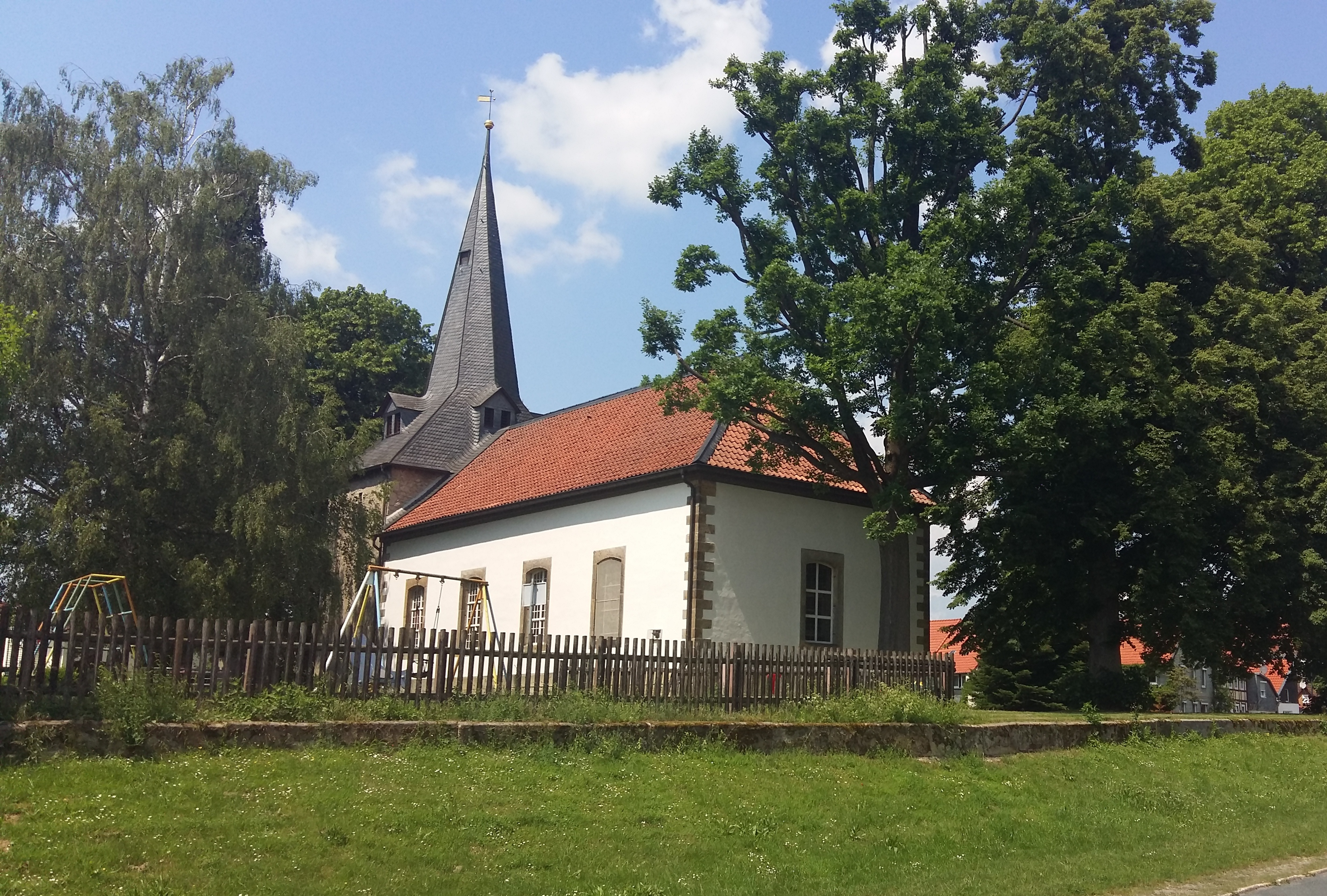 Ev.-luth. Kirche in Bönnien